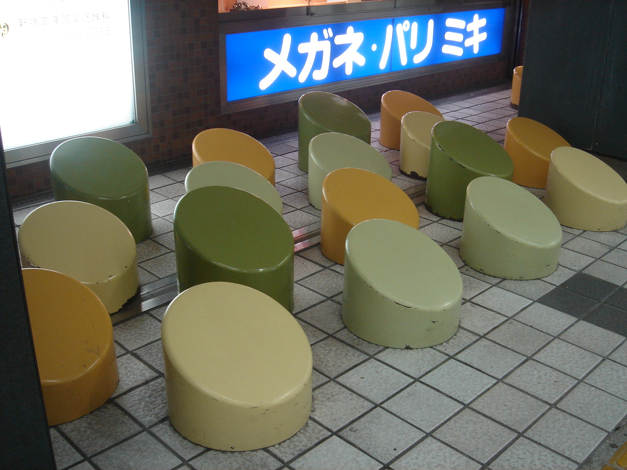 I don't get it. メガネ・パリ ミキ [1]